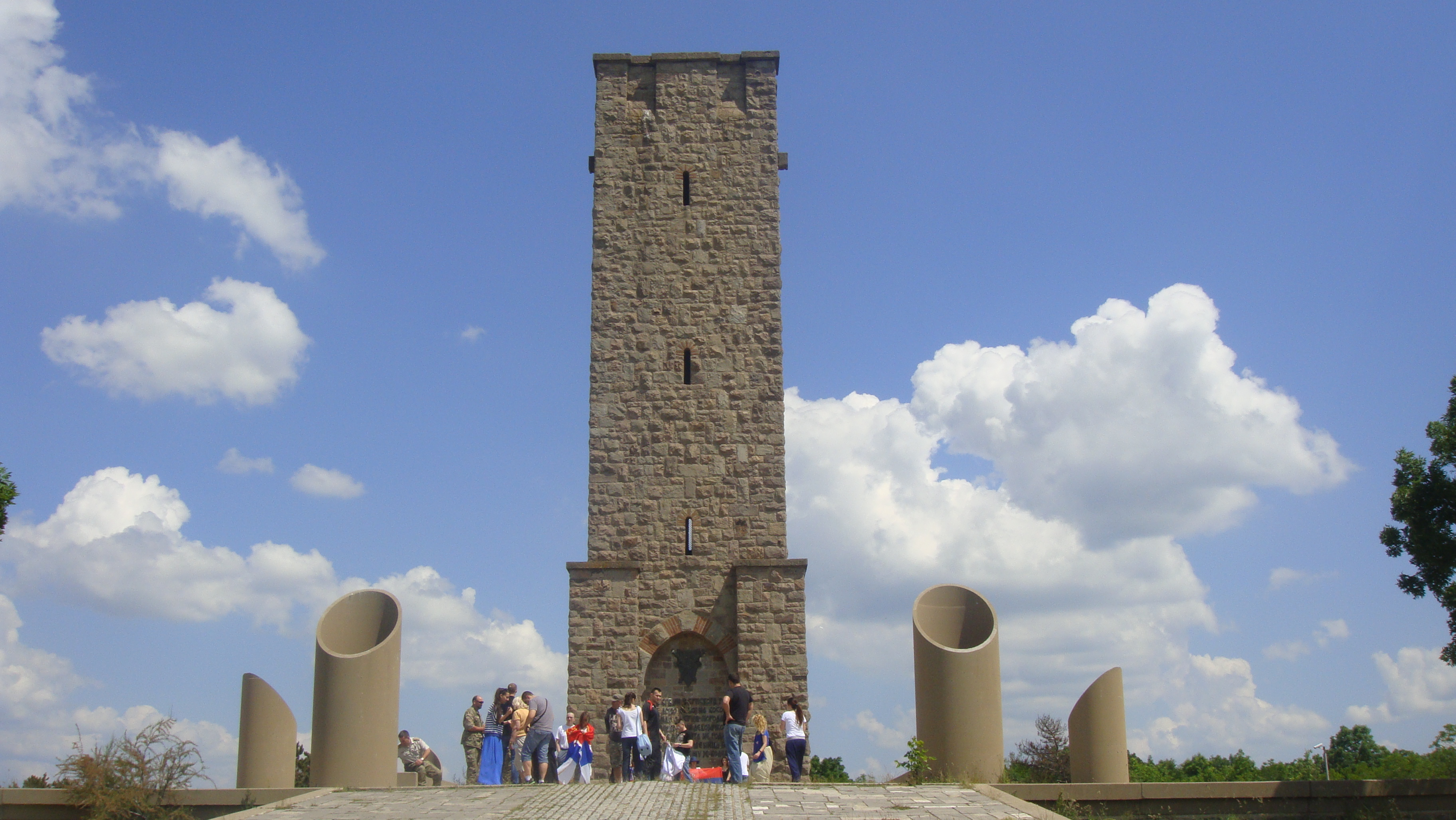 Srpskohrvatski / српскохрватски: Posetioci iz Beograda obilaze Gazimestan početkom juna 2014.